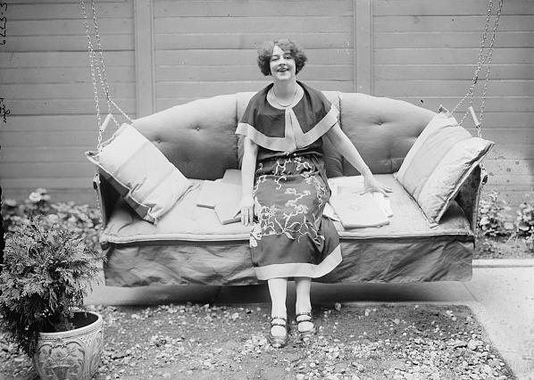 Anna Fitziu (1888-1967), American soprano